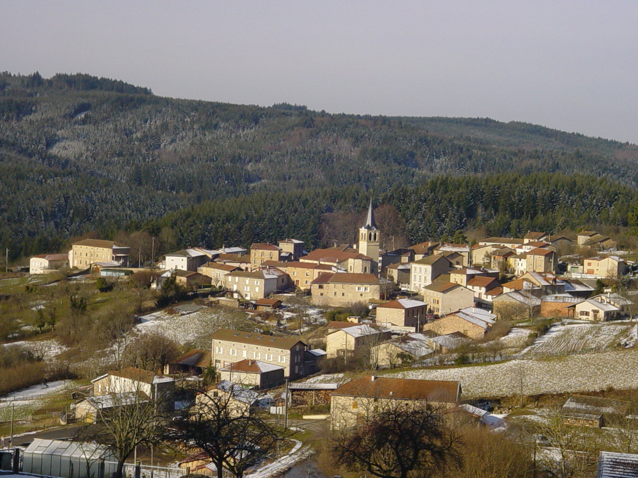 vue de Ranchal